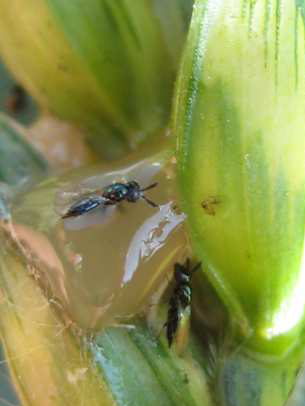 Macroglenes sur miellat de Claviceps purpurea sur blé